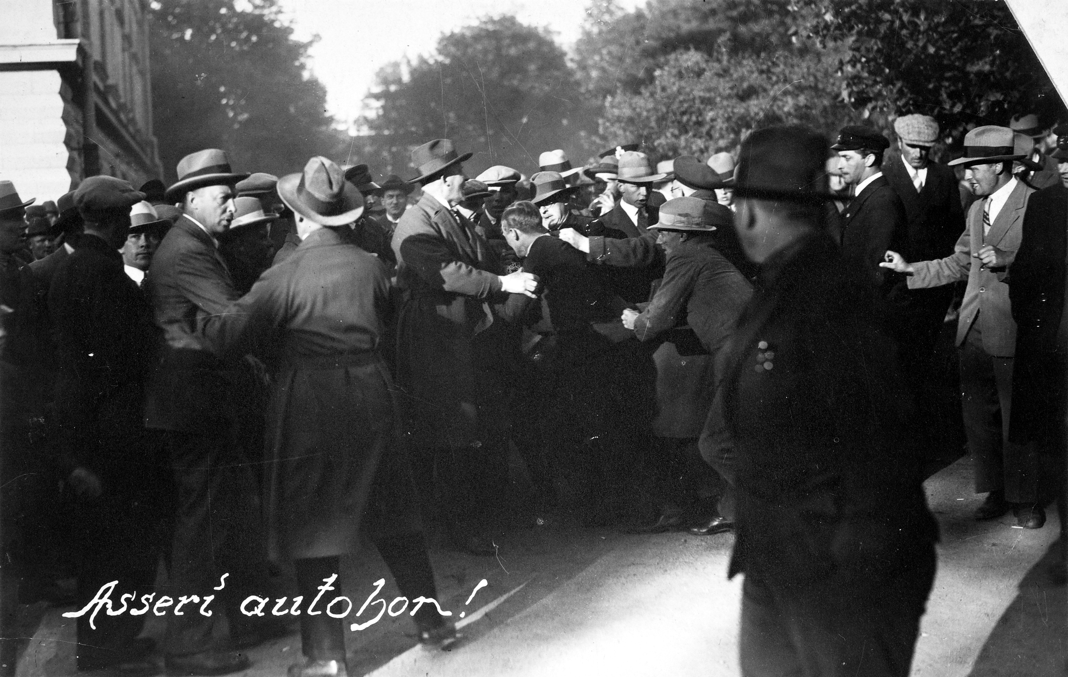 Asianajaja Asser Saloa riepotellaan Vaasan oikeustalon edustalla ja viedään muilutettavaksi.